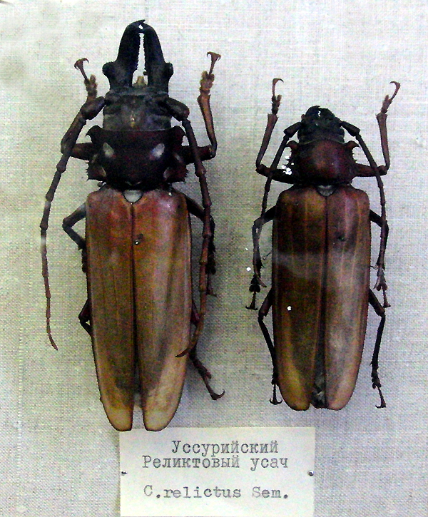 Уссурийский реликтовый усач (Callipogon relictus), эскпонат в музее